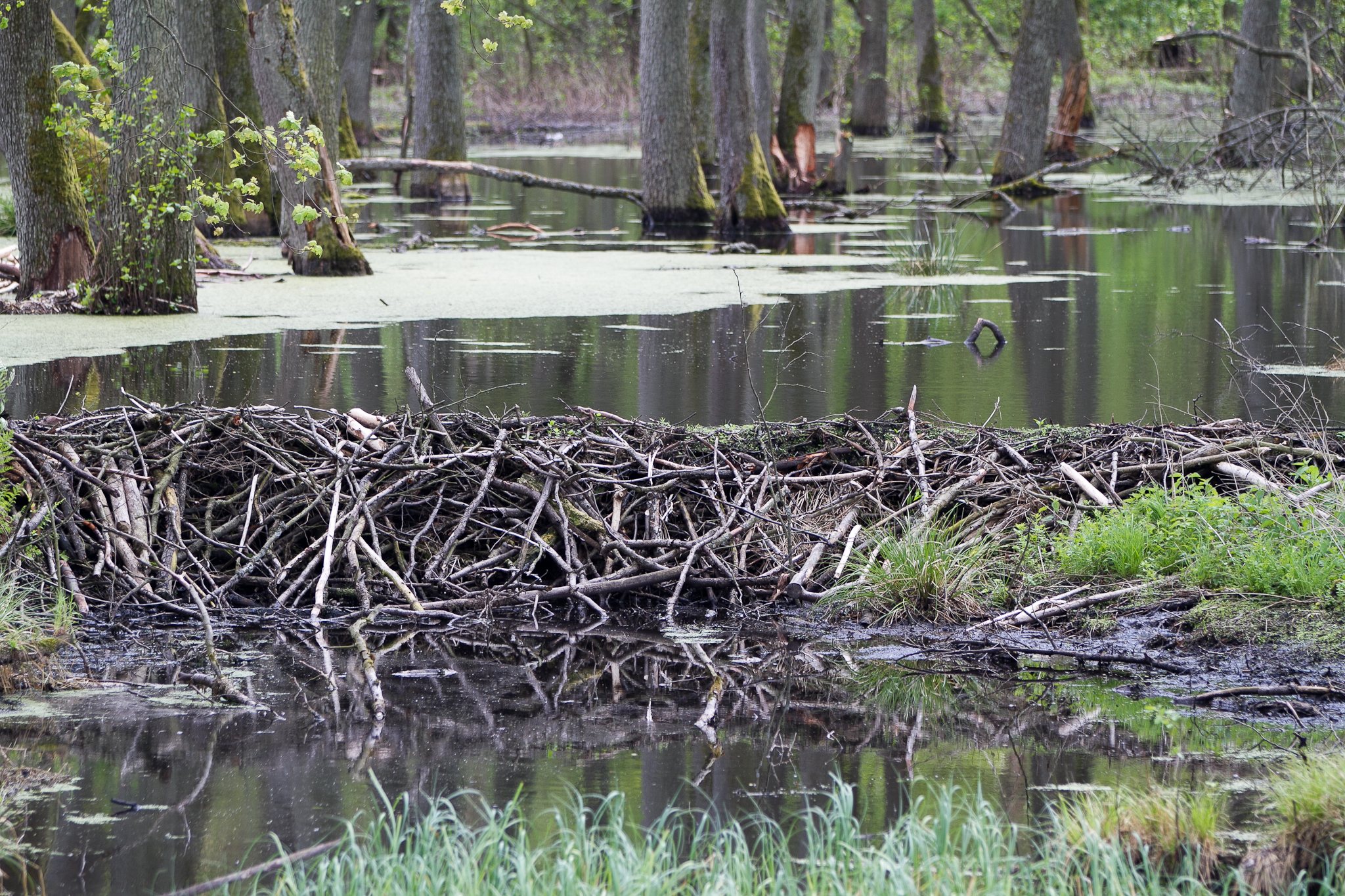 Tama bobrów w Zimnej Wodzie